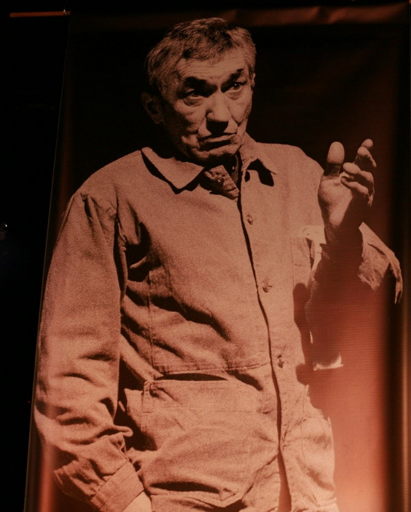 Stéphan Koziak, acteur